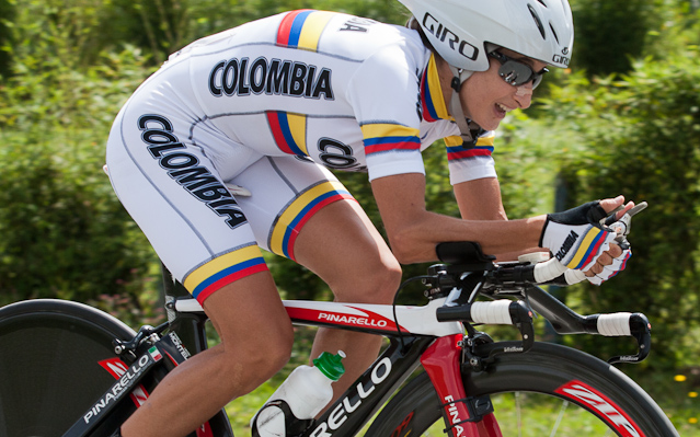 Paola Madriñán en el Campeonato Panamericano de Ciclismo en Ruta 2011